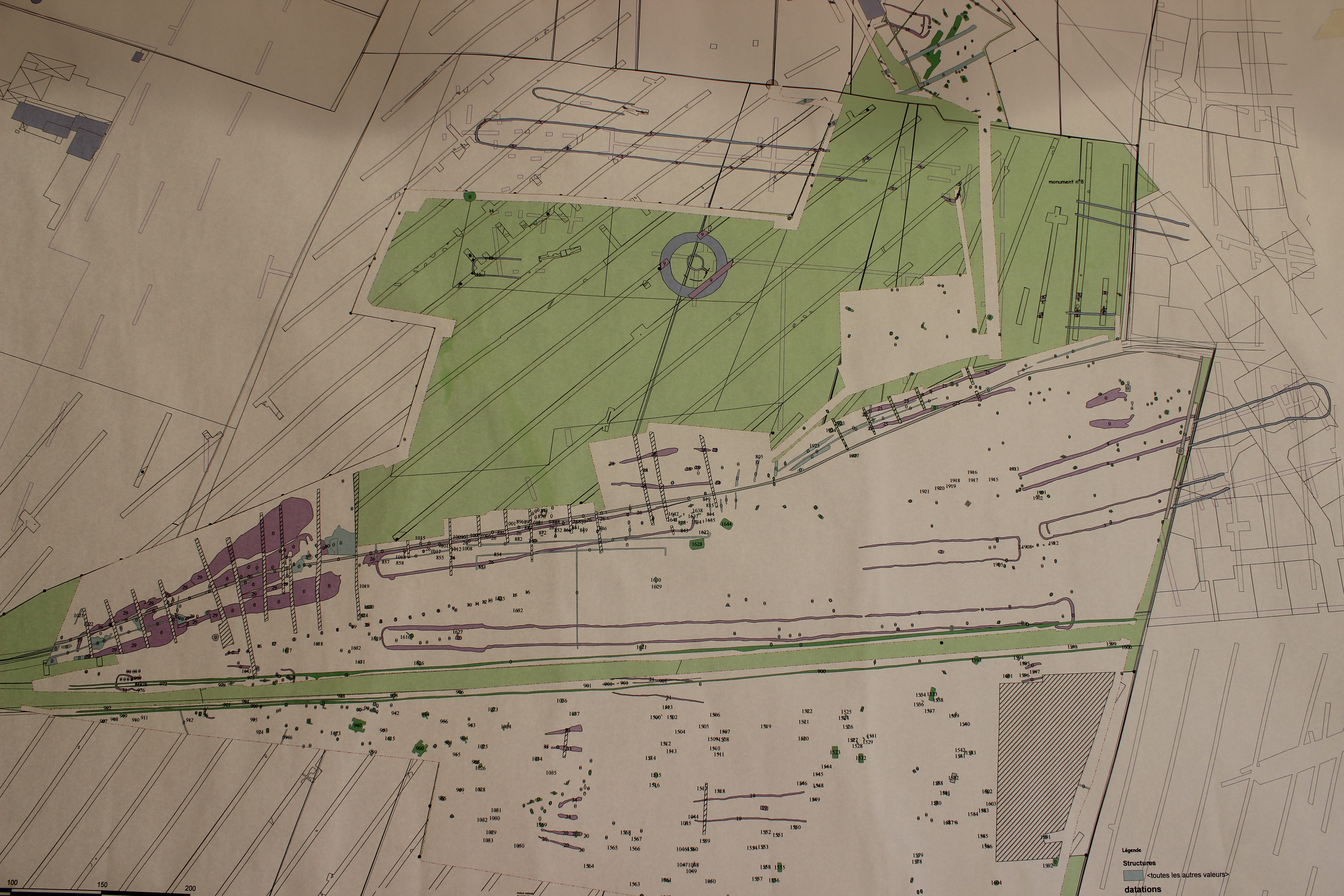 Plan des fouilles de la nécropole de Fleury sur Orne